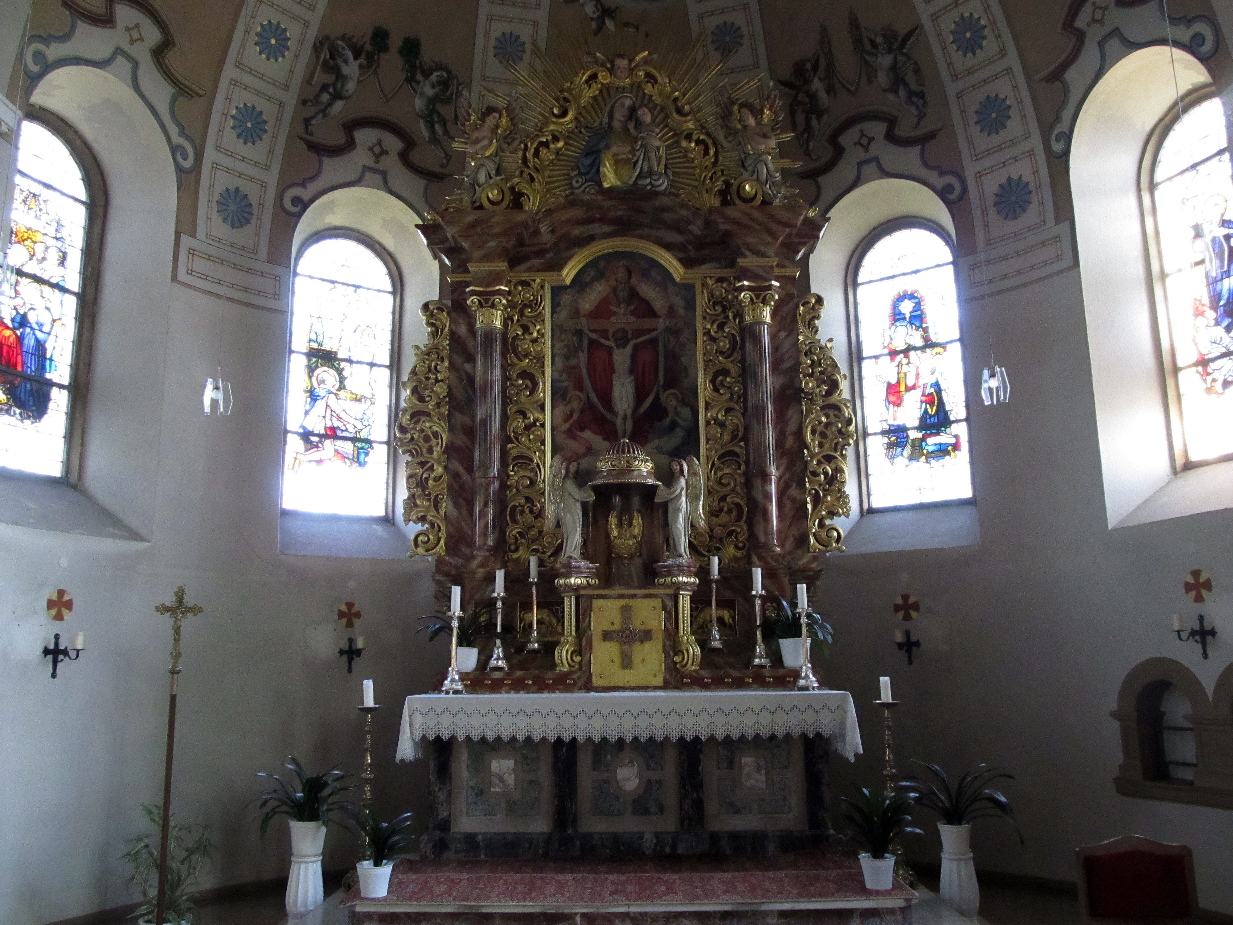 Hochaltar der katholischen Pfarrkirche St. Aloysius in Steinbach, einem Stadtteil von Lebach, Saarland